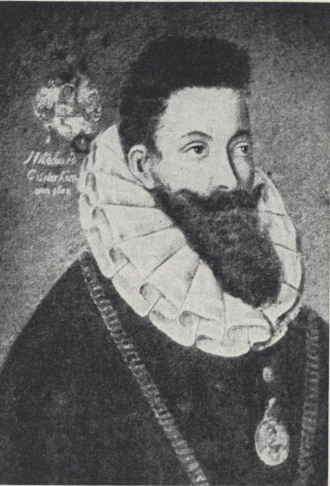 Bildnis Hildebrand Giseler Rumann (1568–1631). Gemälde im II. Weltkrieg zerstört.